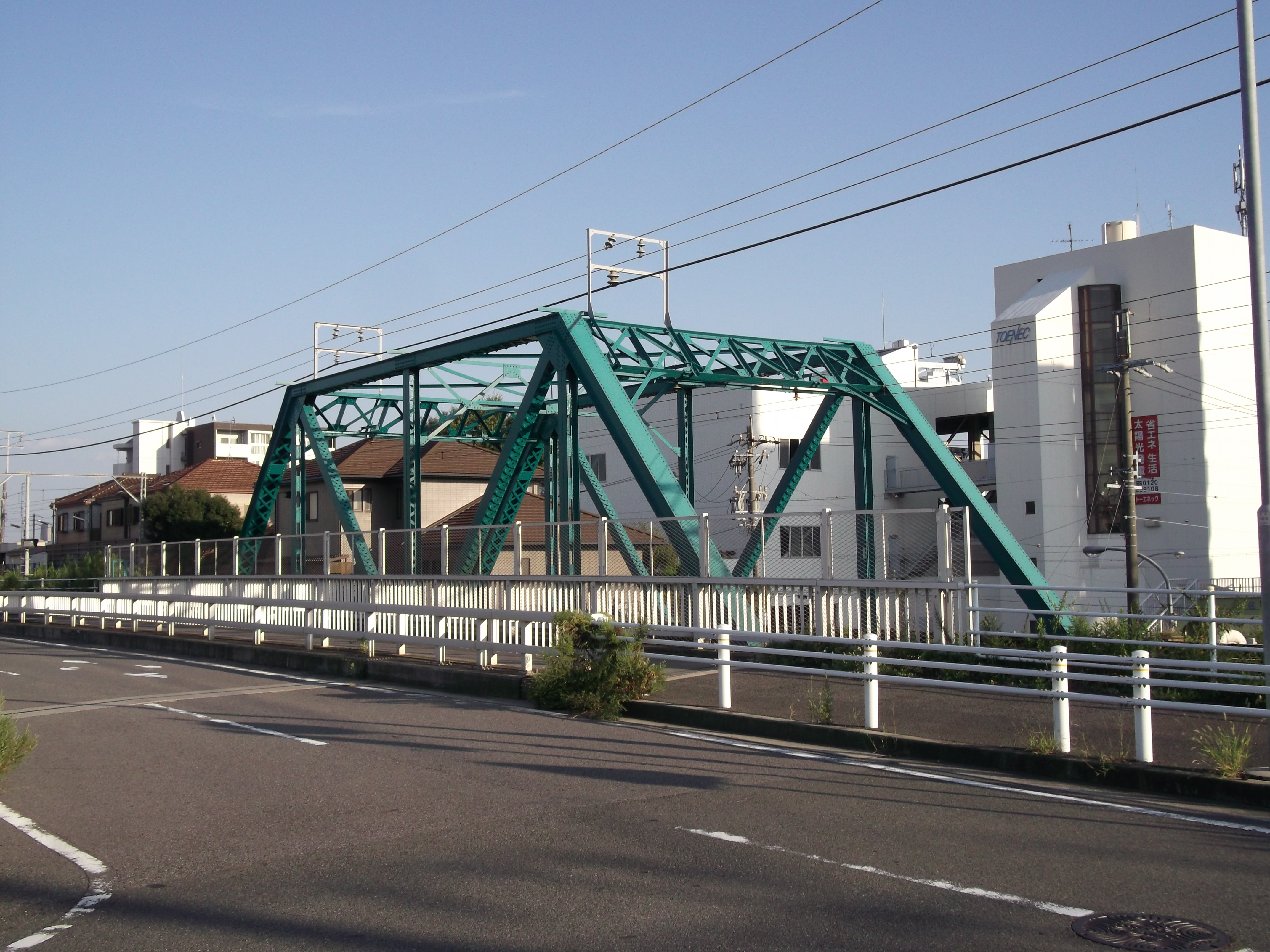 名古屋市東区の矢田橋梁を北側公道西側より撮影